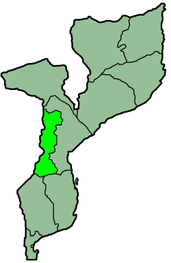 Map of Manica Province, Mozambique